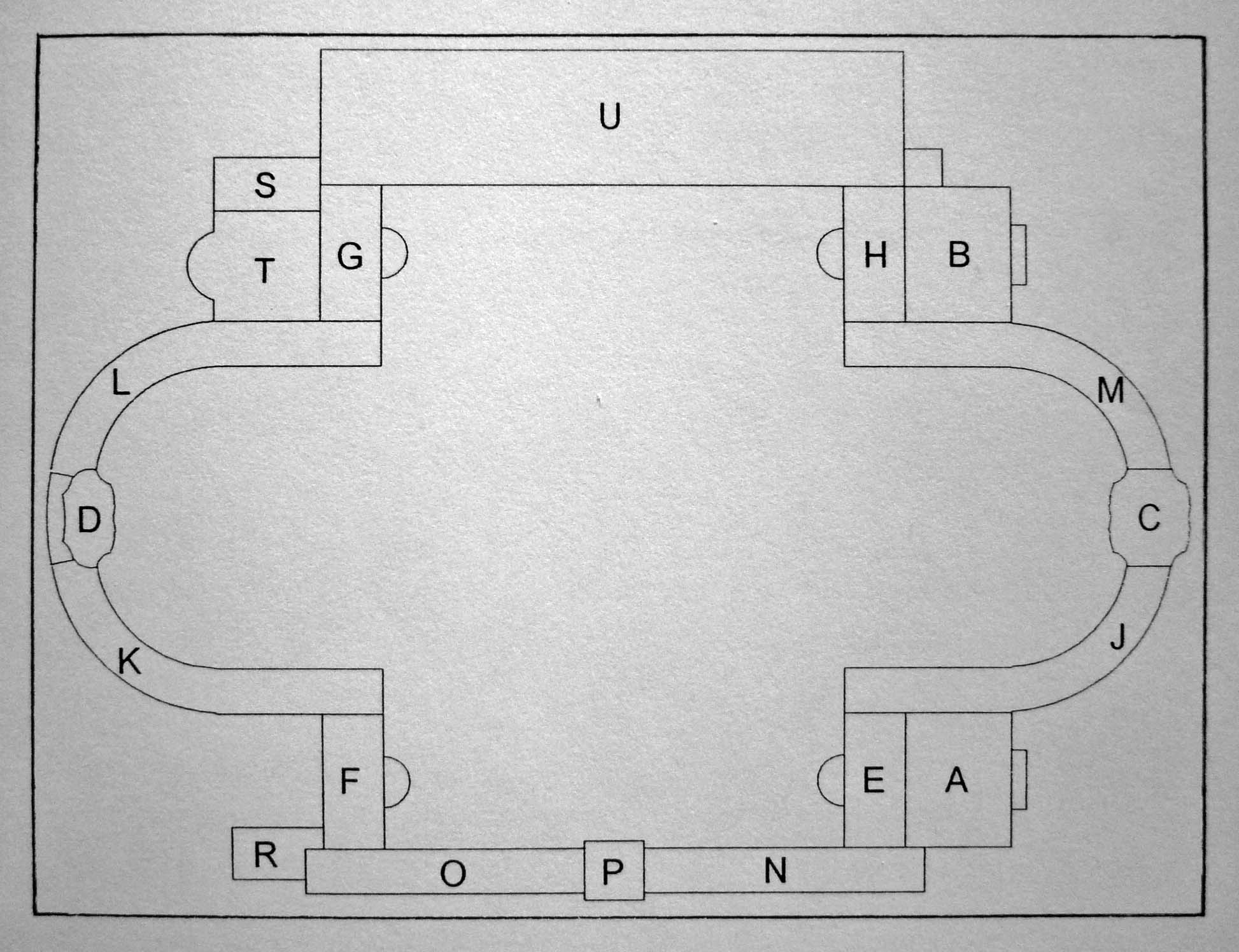 Anordnung und Benennung der Pavillons des Zwingers nach Dürre